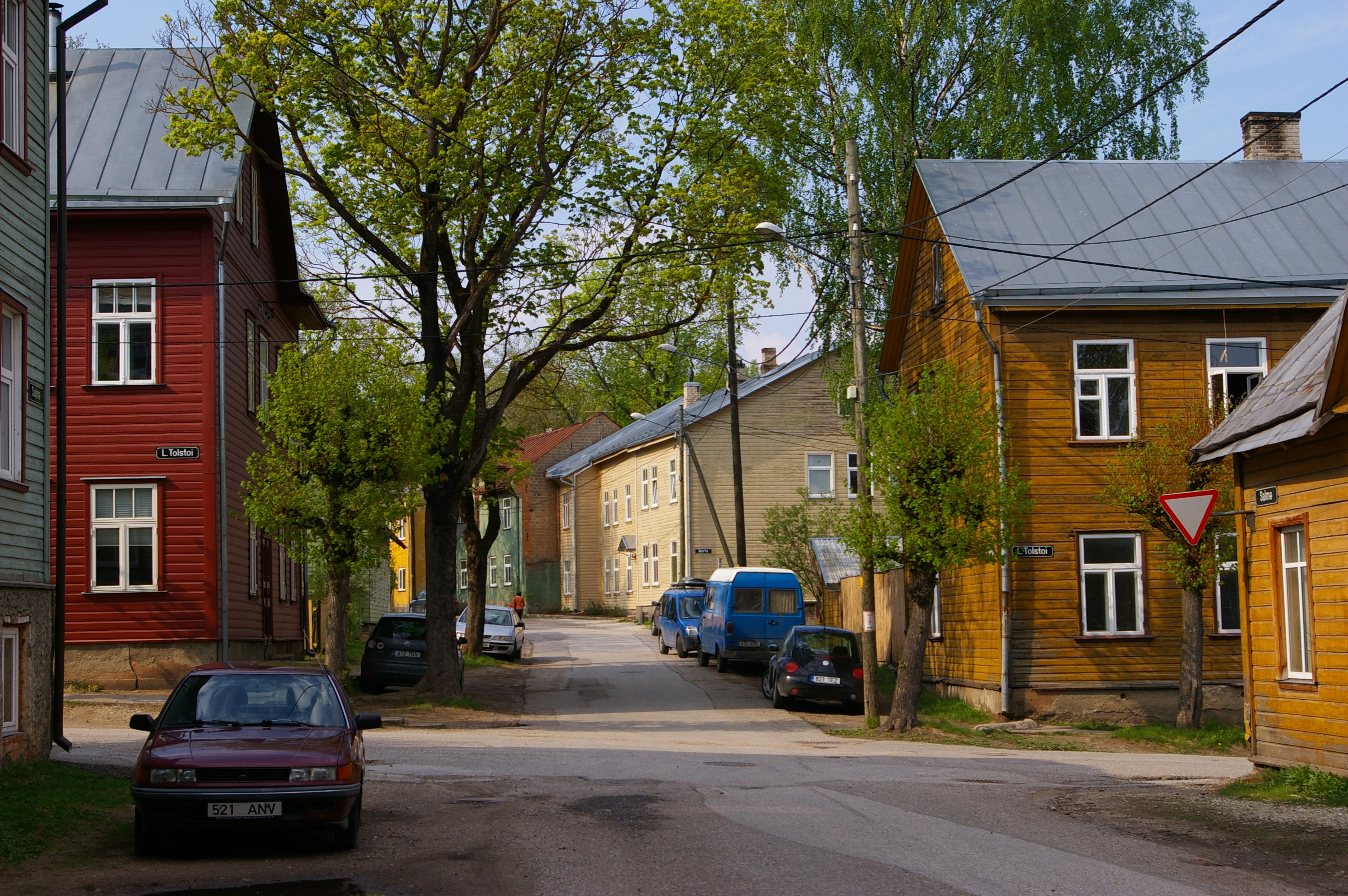 Tartu, Karlova